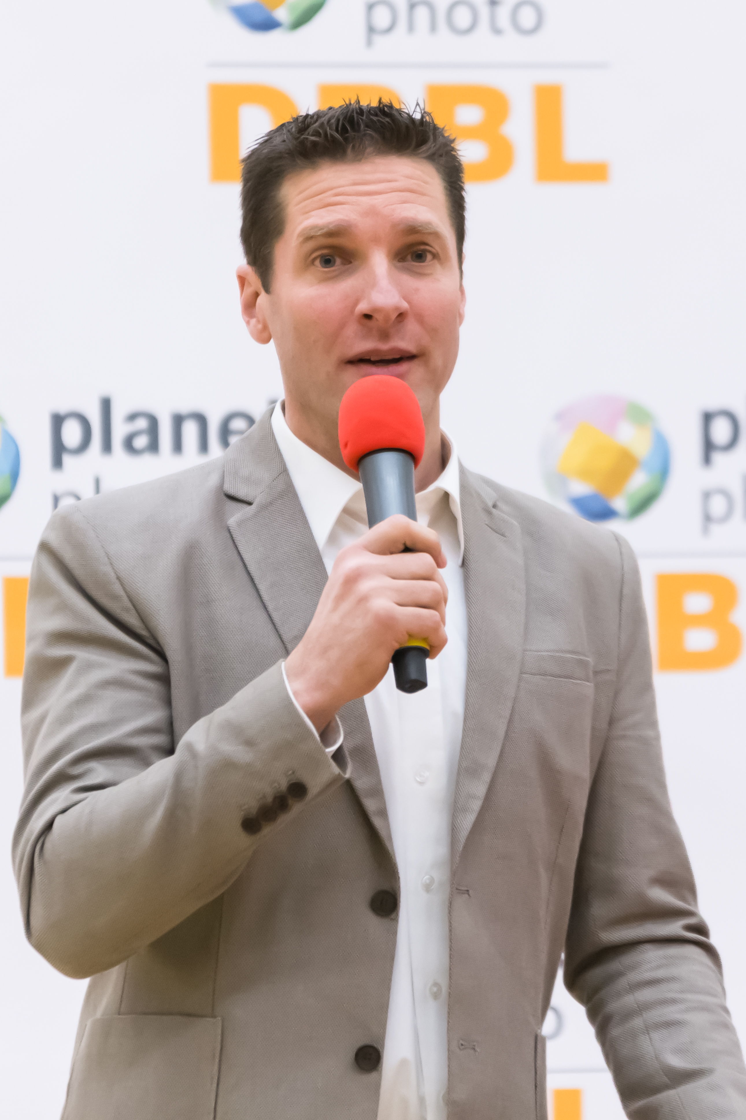 Basketball, 1. Damen-Basketball-Bundesliga, ChemCats Chemnitz - TuS Bad Aibling Fireballs; DBBL-Geschäftsführer Achim Barbknecht; Porträt, Einzelbild